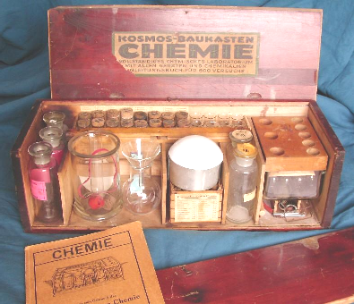 Kosmos-Baukasten Chemie